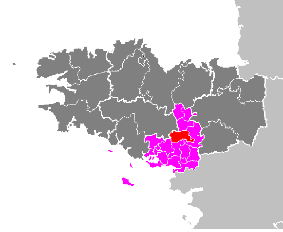 Maps of arrondissements and cantons of France: Arrondissement de Vannes - Canton de Malestroit.PNG